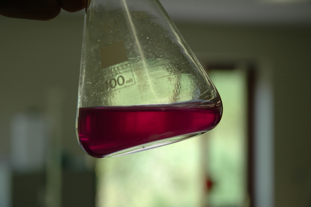 Phenolphthalein